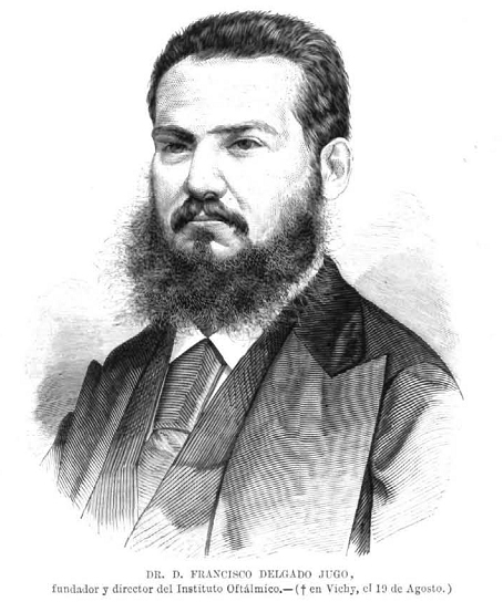 Francisco Delgado Jugo, fundador y director del Instituto Oftálmico, en la revista española La Ilustración Española y Americana.